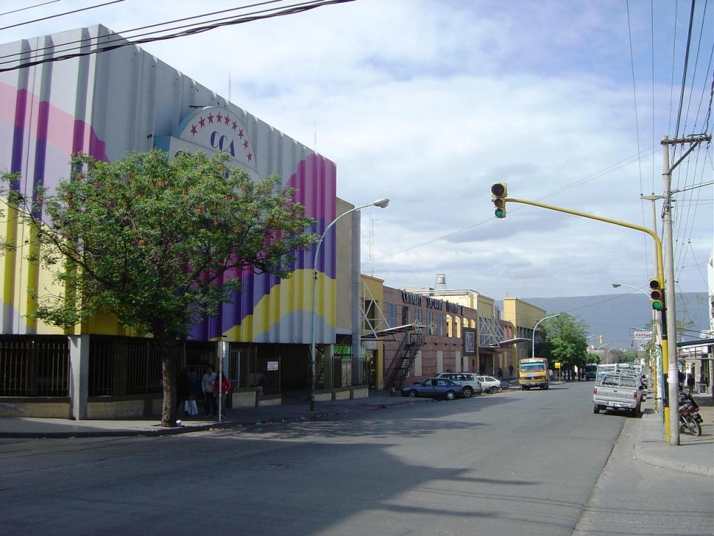 Terminal de ómnibus de San Fernando del Valle de Catamarca.